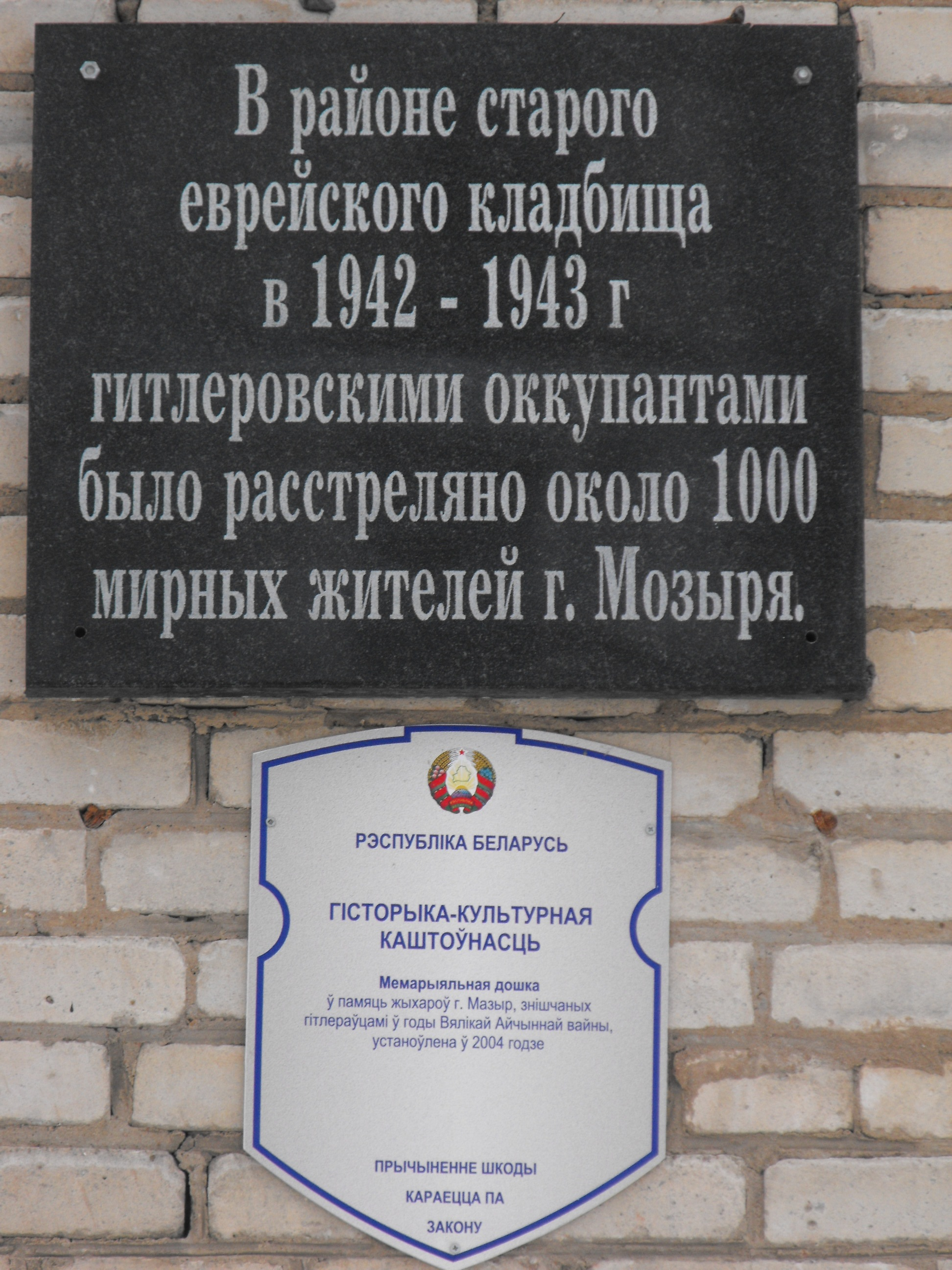 Мемориальная табличка в память об убитых евреях Мозыря, установленная на здании бывшей школы № 4, ныне лицея (улица Рыжкова, 42).